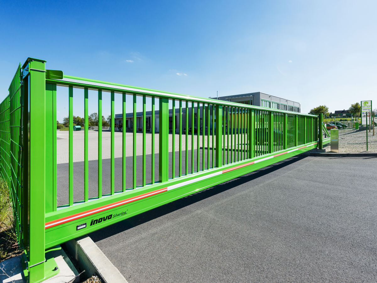 Freitragendes Inova Schiebetor